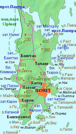 Мапа острова Пхукет